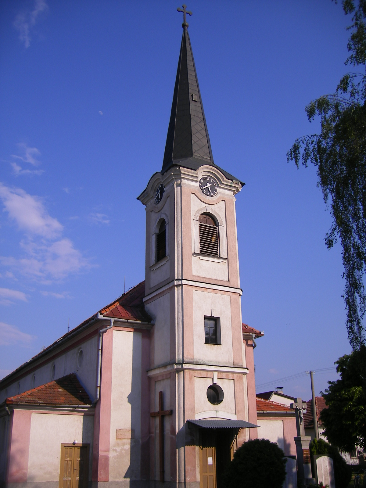 Szímő - Szent Márton katolikus templom